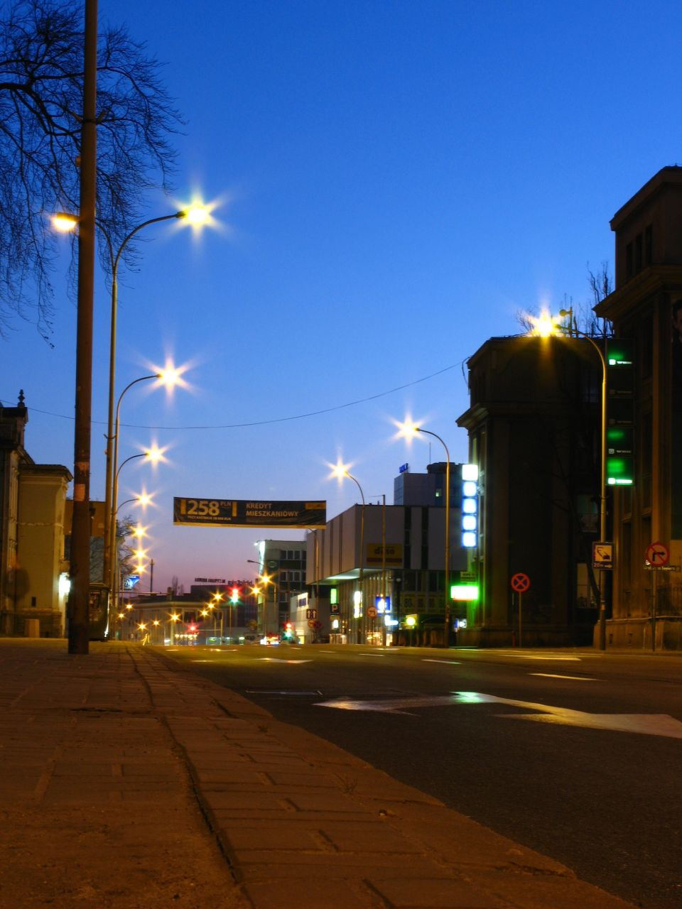 Zielona Góra - ul. Westerplatte wieczorem